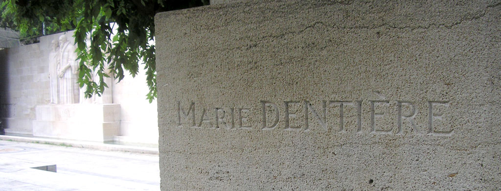 Inscription du nom de Marie Dentière sur le Mur des Réformateurs à Genève, à l'arrière de la stèle dédiée à Zwingli.